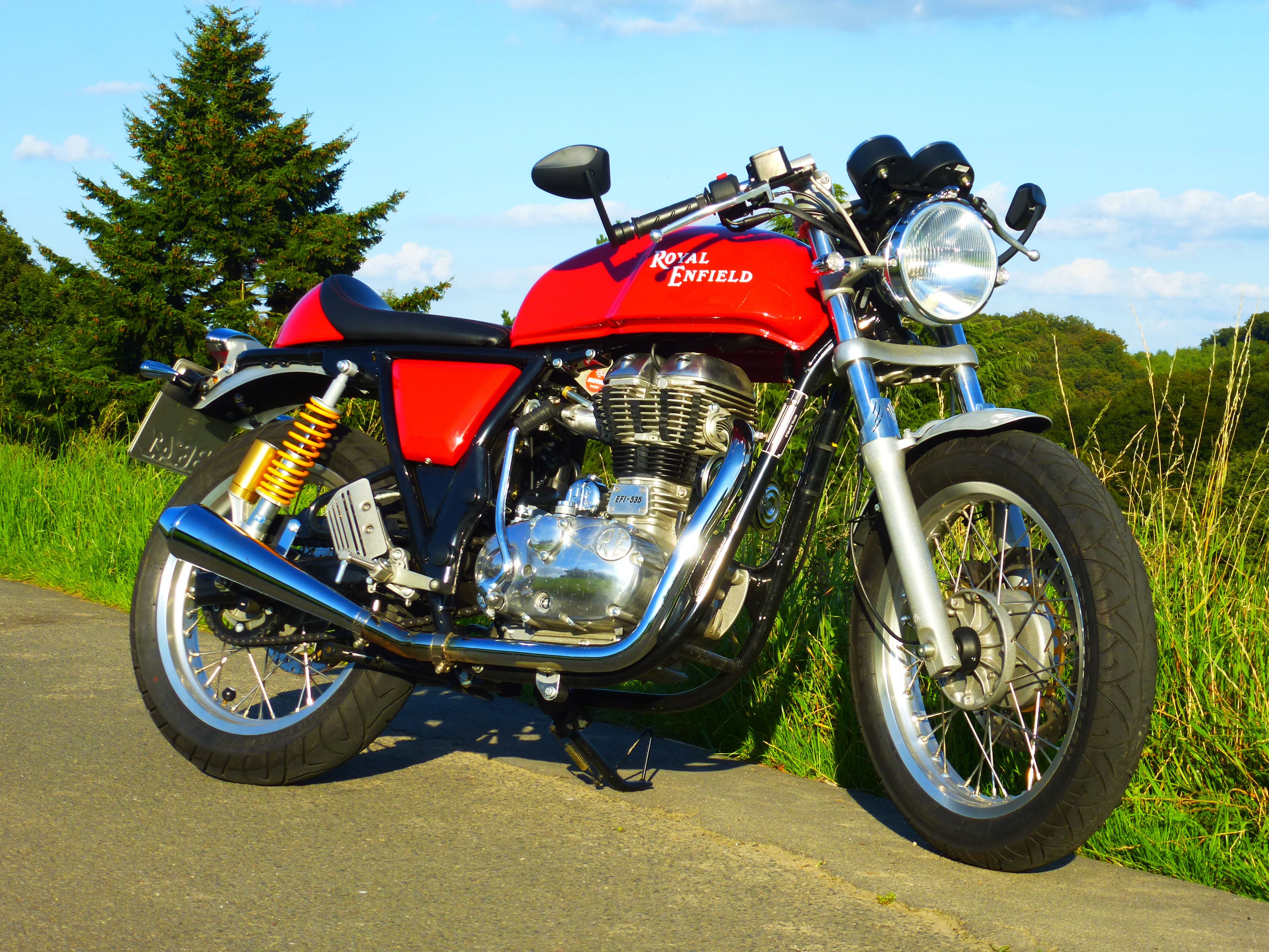 Royal Enfield Continental GT 535ccm